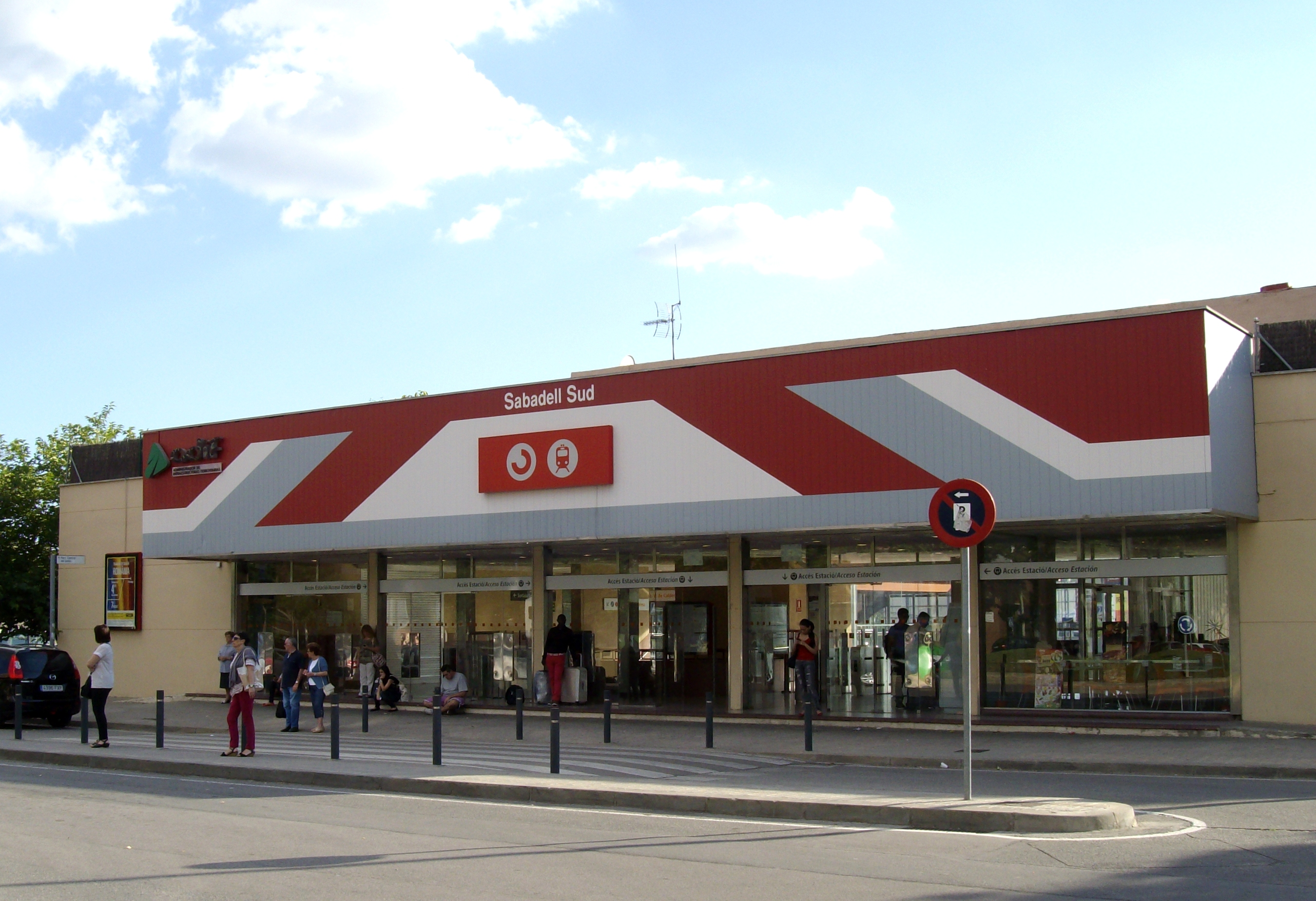 Estación de tren de RENFE Sabadell Sur.